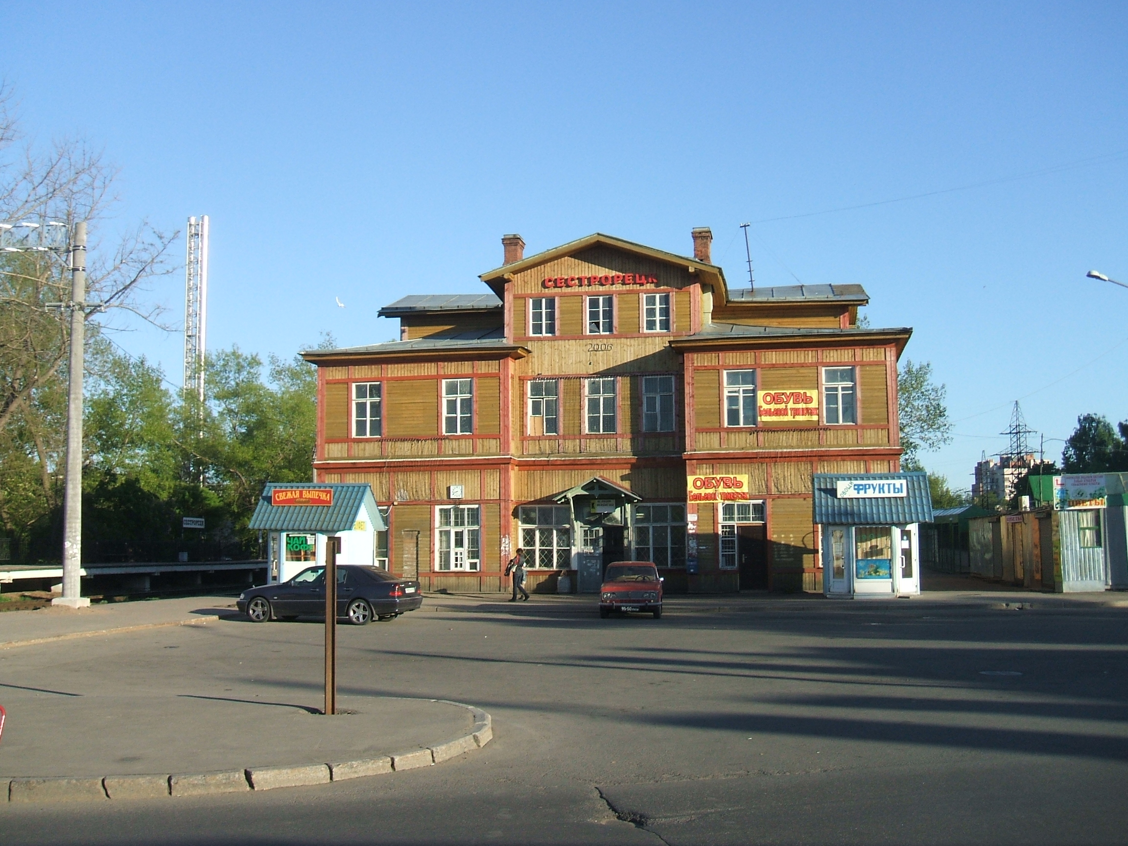 Здание вокзала в Сестрорецке на Дубковском шоссе